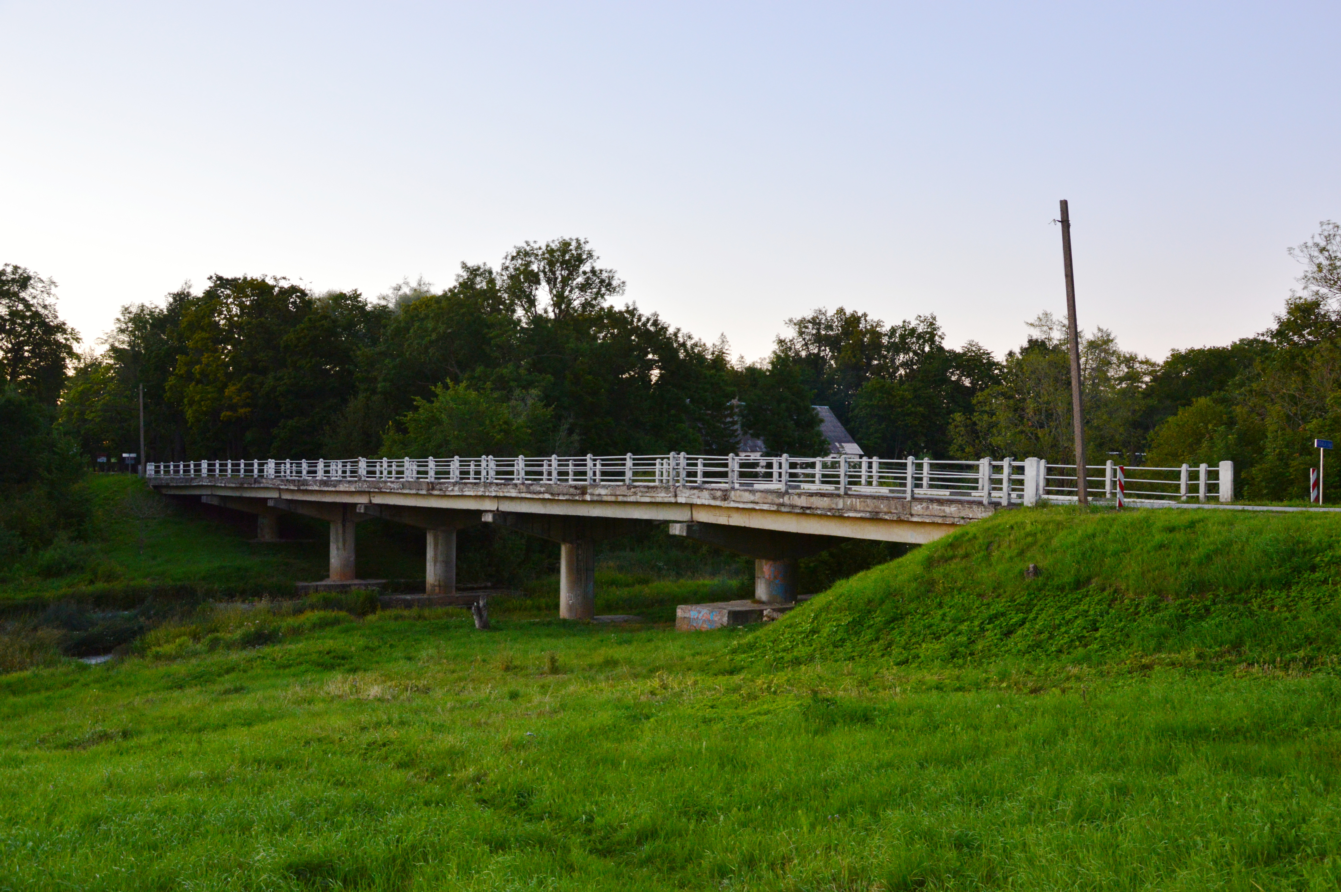 Vana-Vigala sild